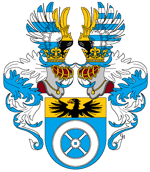 Wappen des tschechisch-österreichischen Unternehmers Emanuel Grab (1868–1929), verliehen anlässlich seiner Erhebung in den österreichischen Ritterstand mit dem Prädikat "von Hermannswörth" 1915. Zeichnung von Gerd Hruška ( Für weitere Informationen zu dieser Standeserhebung siehe (